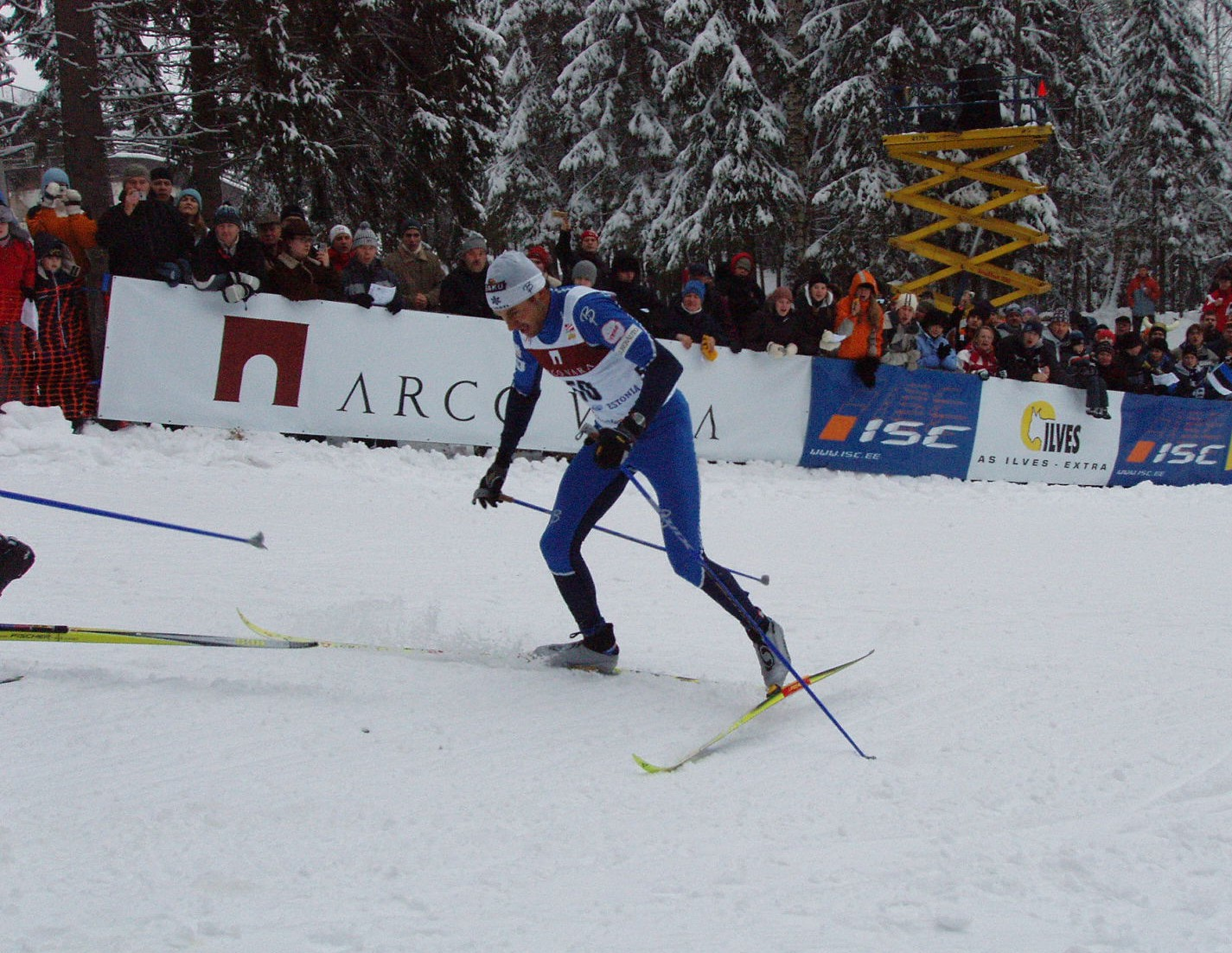 Andrus Veerpalu Otepää MK etapil 2006. aastal